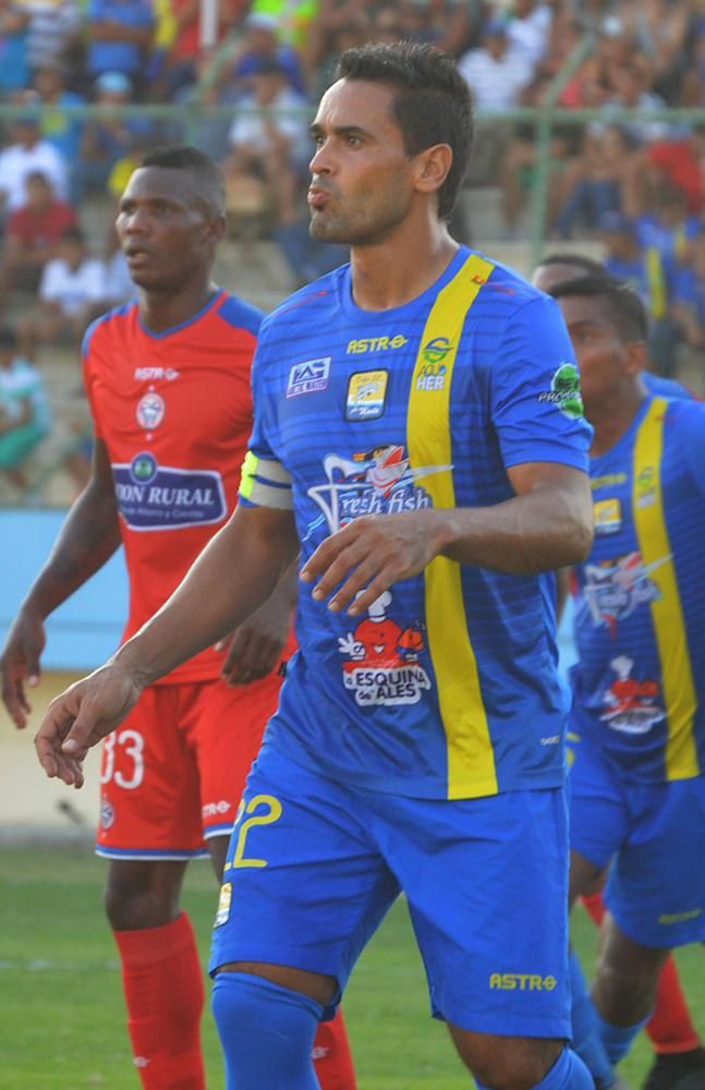 Pablo Saucedo con la camiseta de Delfín en 2015